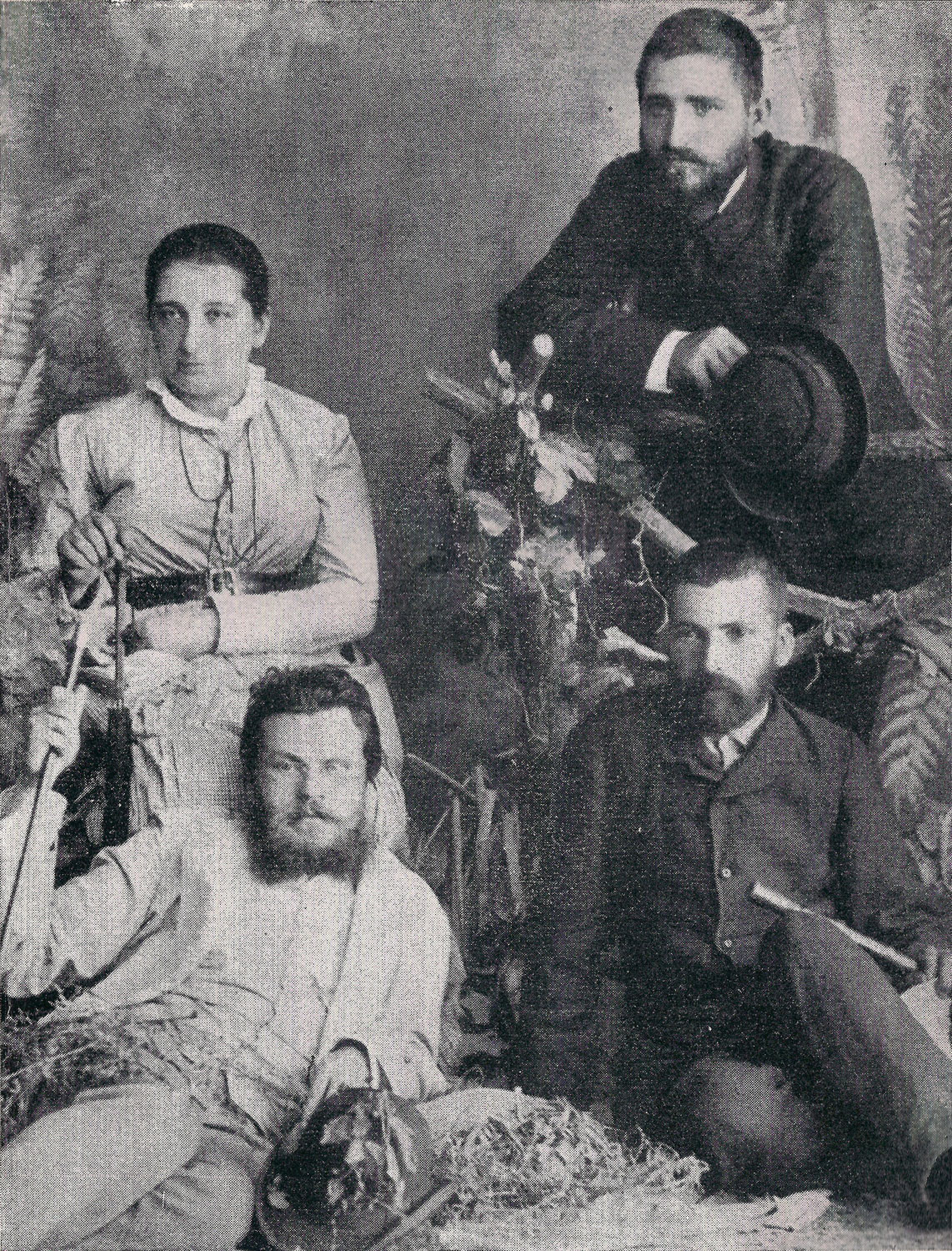 Захарий Стоянов, Димитър Ризов, Александър Головин, Анастасия Головина.